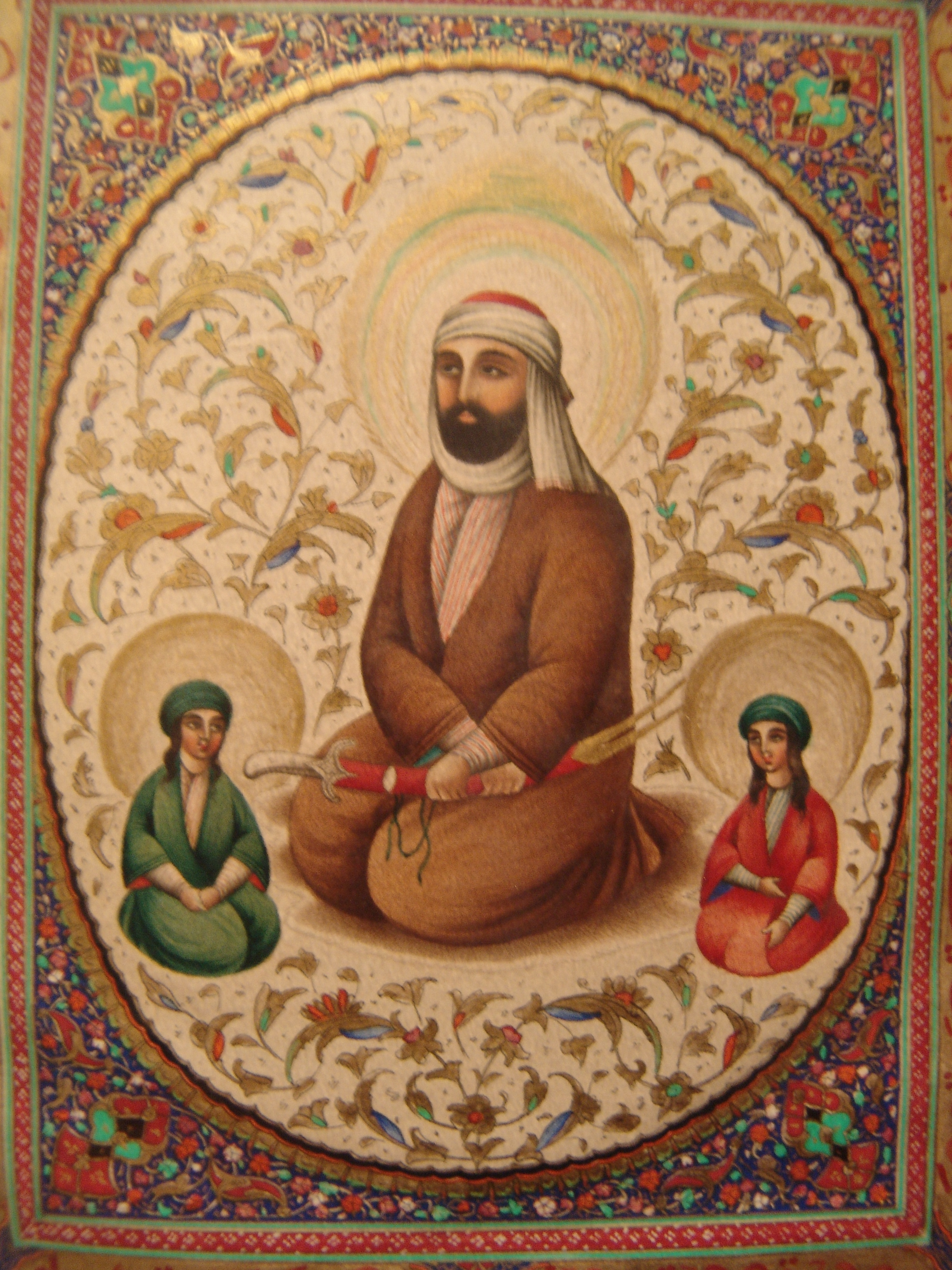 علی و فرزندانش، حسن و حسین